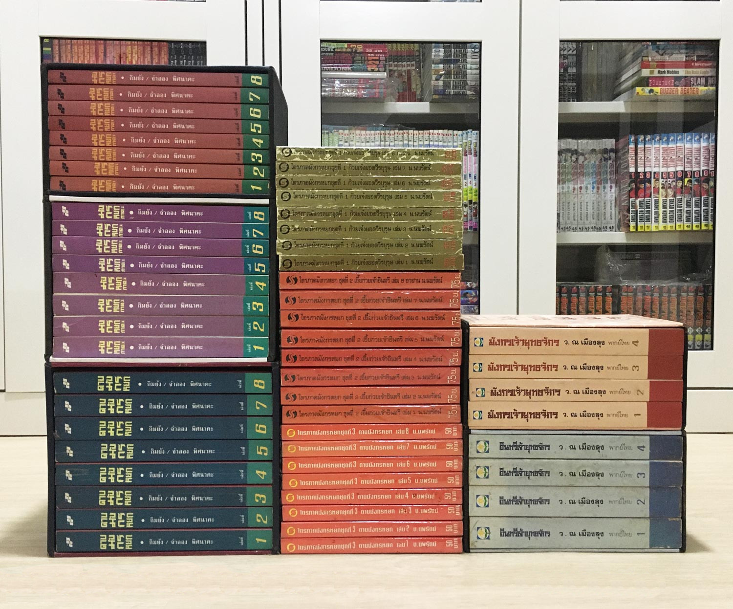 หนังสือมังกรหยกที่จัดพิมพ์ในประเทศไทย ช่วงปี 2535-2538 มีทั้งสิ้น 3 สำนักพิมพ์